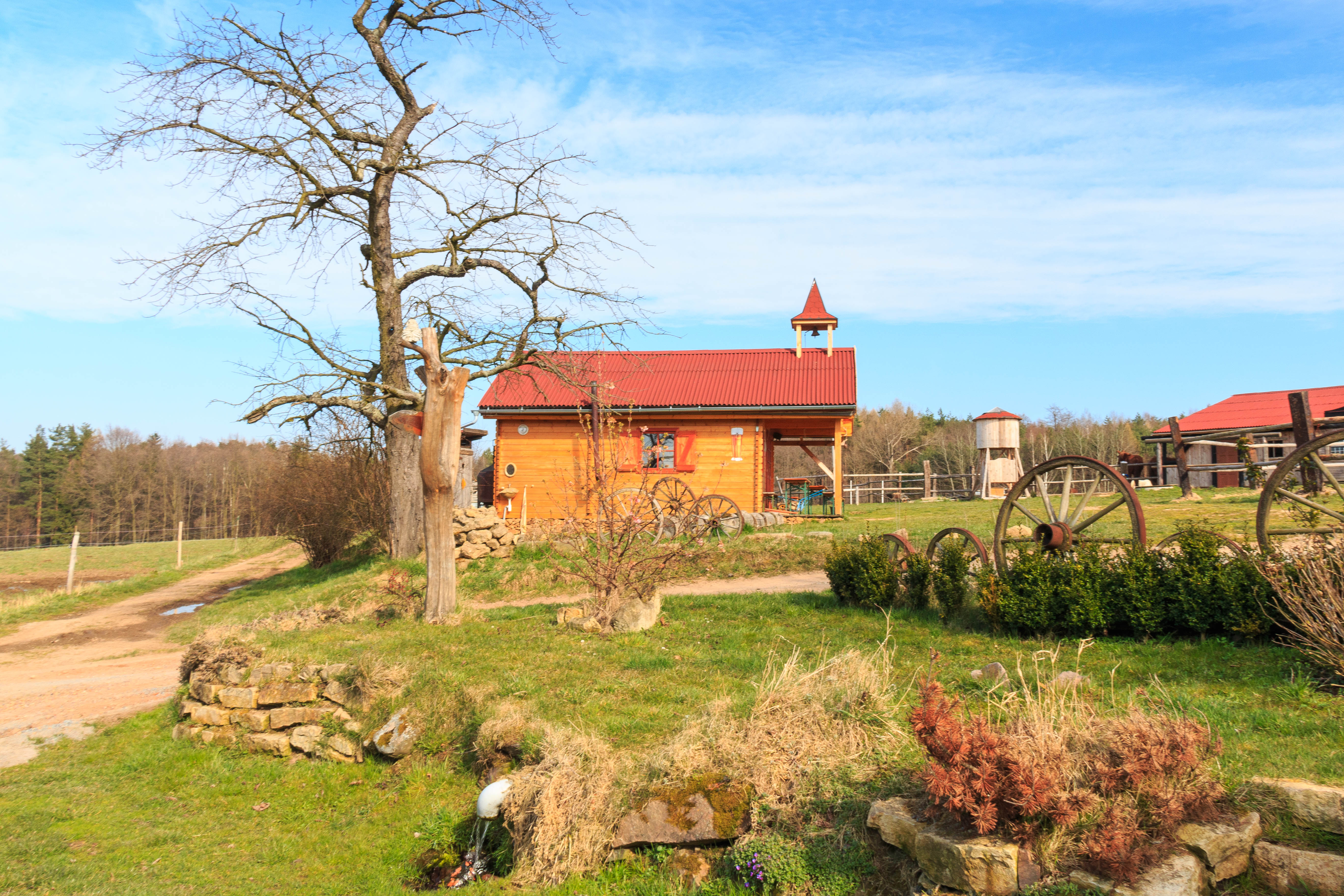 Prostějov ranč